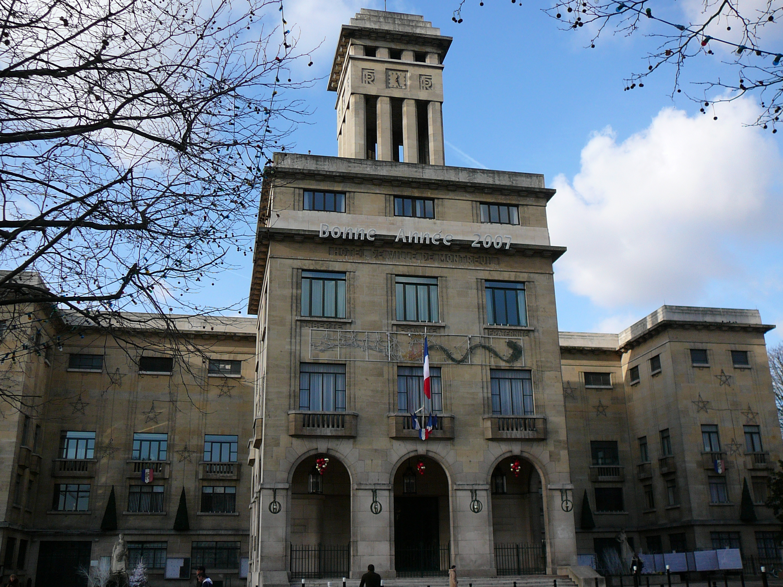 Mairie de Montreuil, France